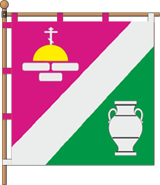 Прапор смт Солоне